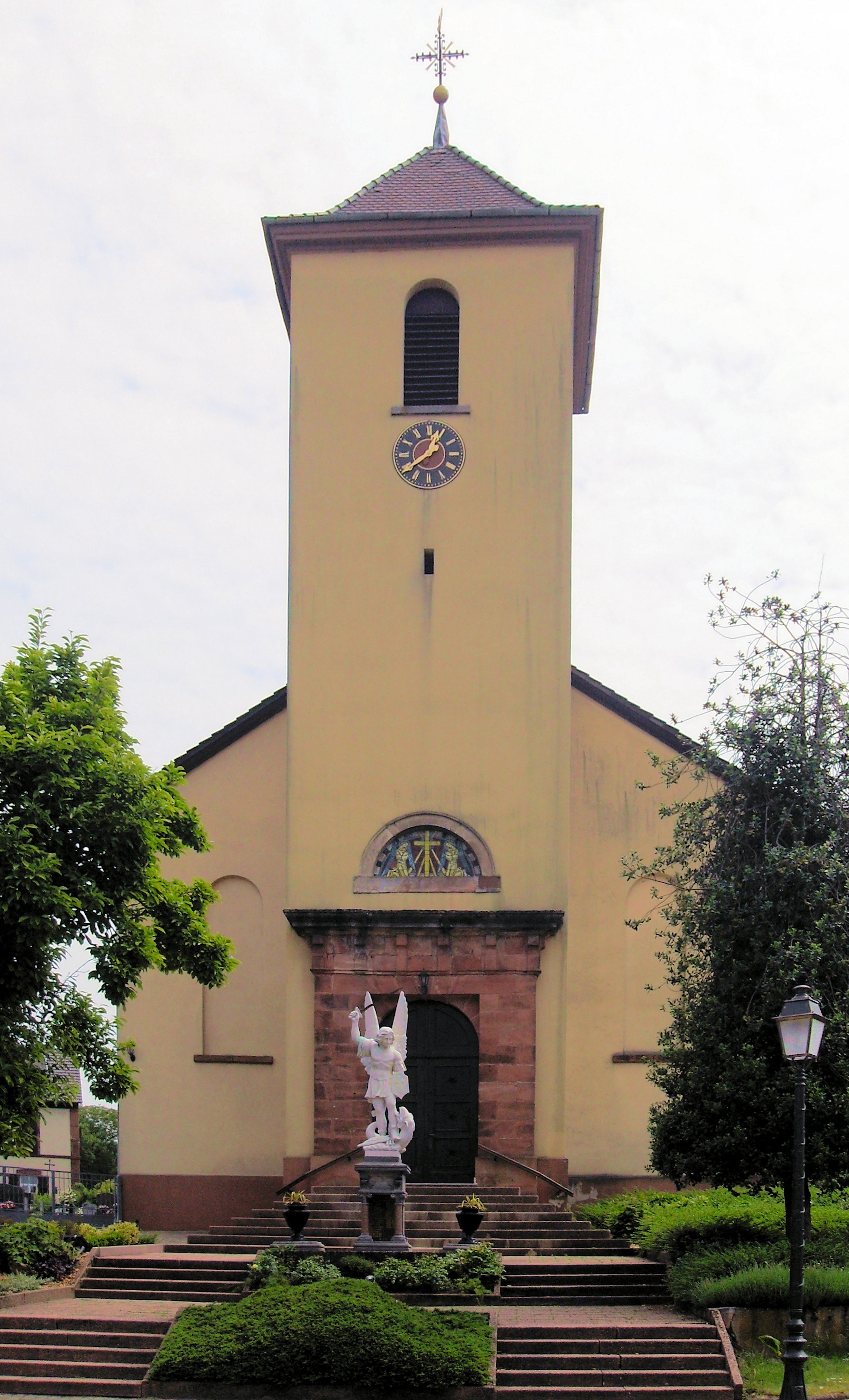 L'église Saint-Michel de Neewiller-près-Lauterbourg, côté ouest